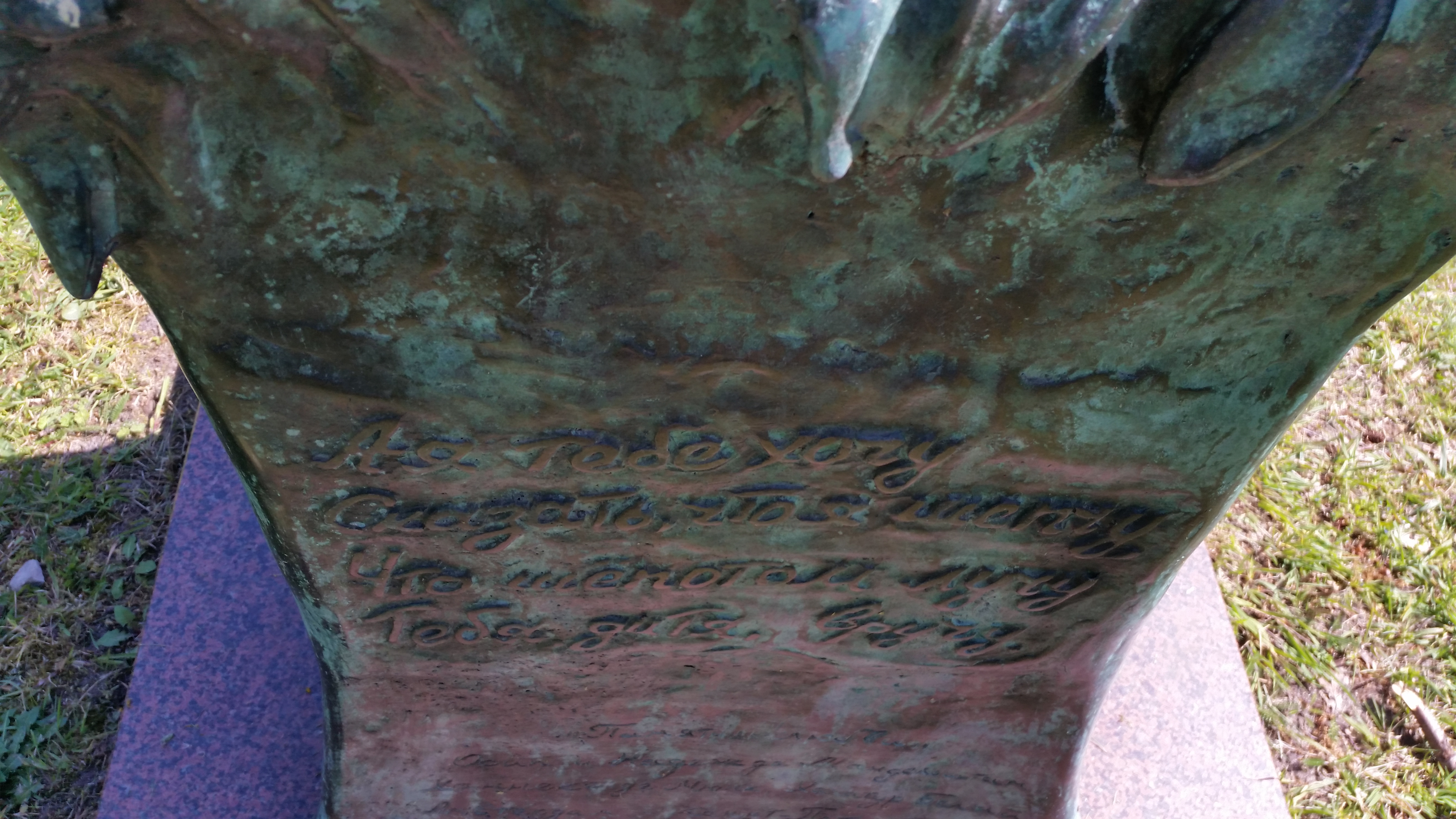 Impressie van het beeld Monument voor de liefde van Hanneke de Munck etc. in Amsterdam-Zuidoost